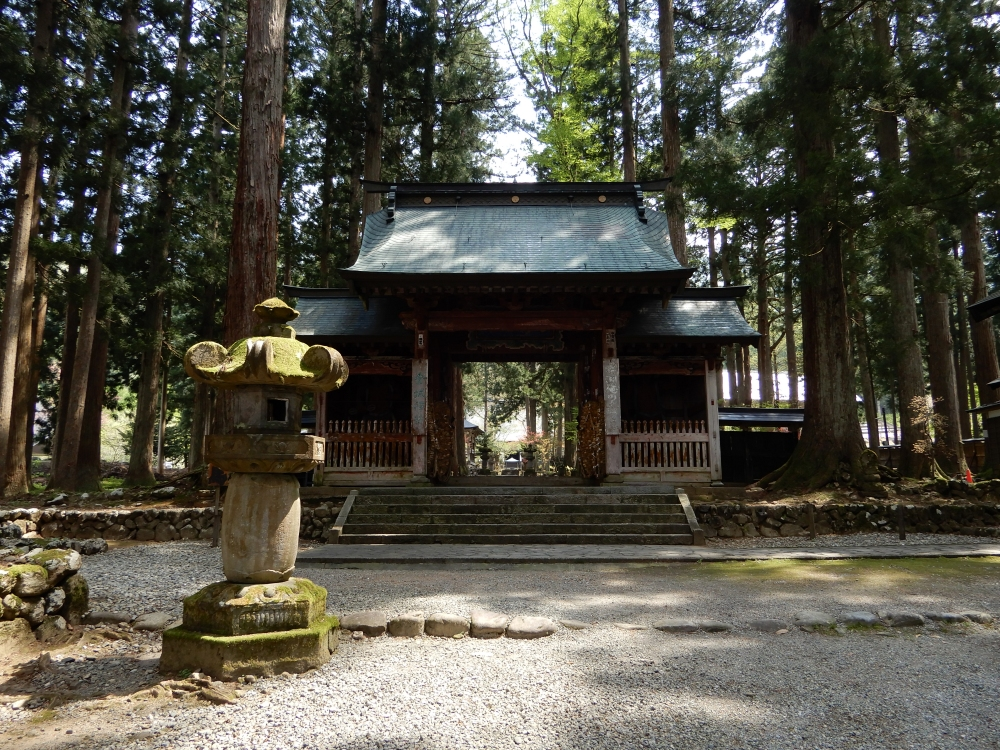 雲洞庵赤門